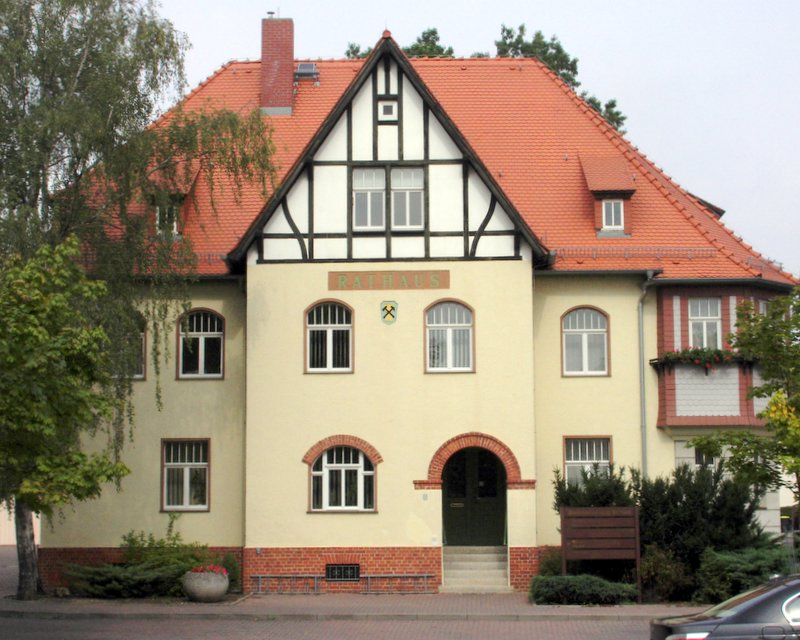 Rathaus Böhlen